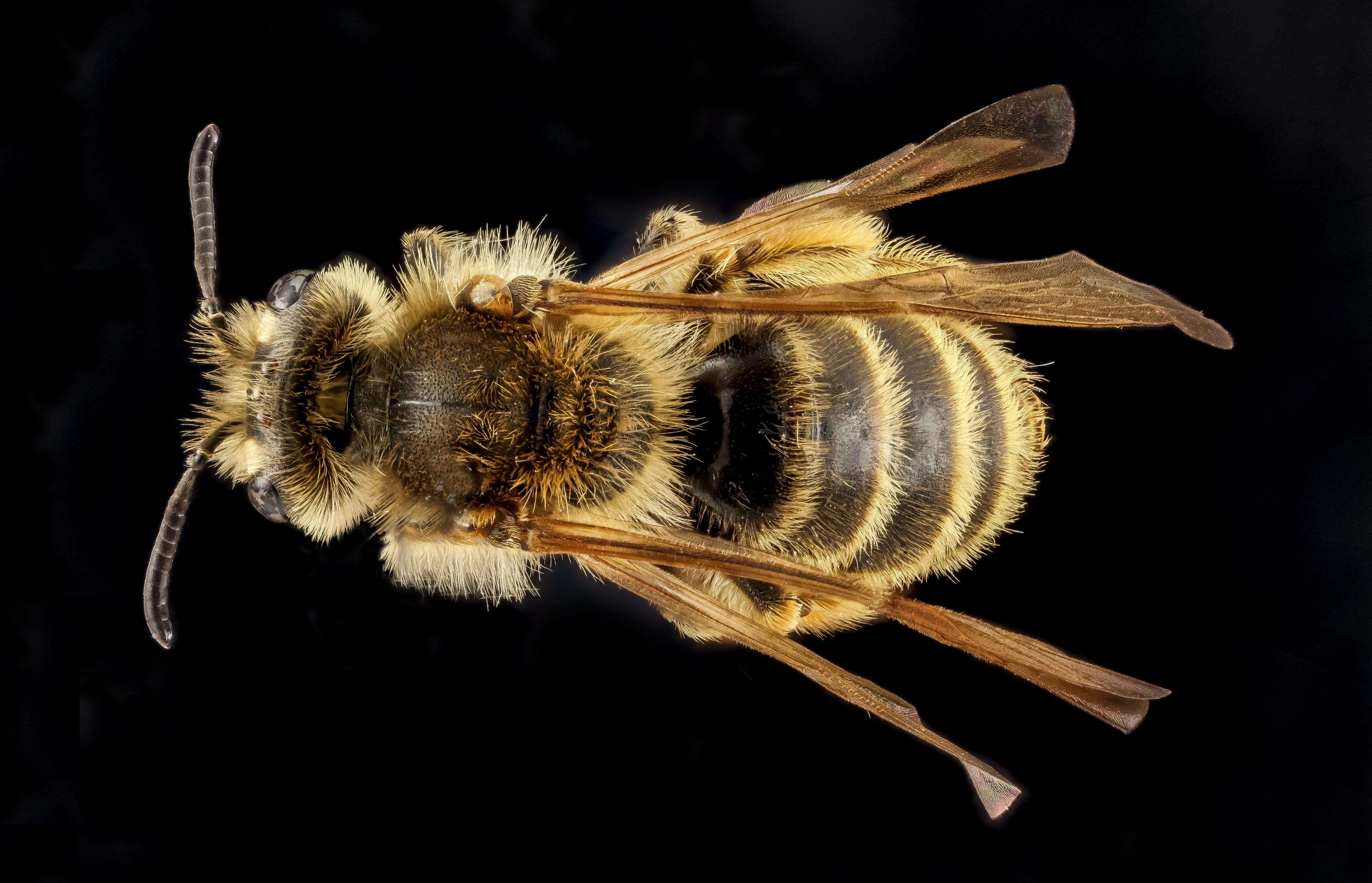 Andrena astragali, South Dakota, Badlands National Park